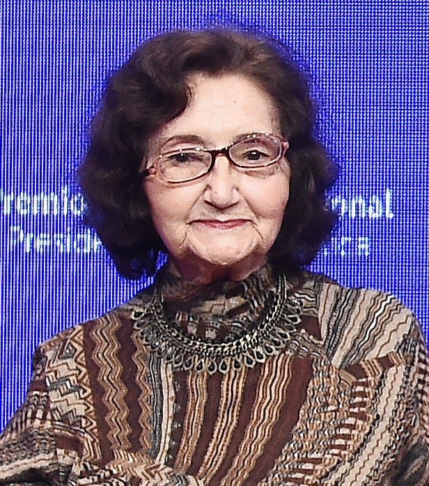 Gobierno de Chile